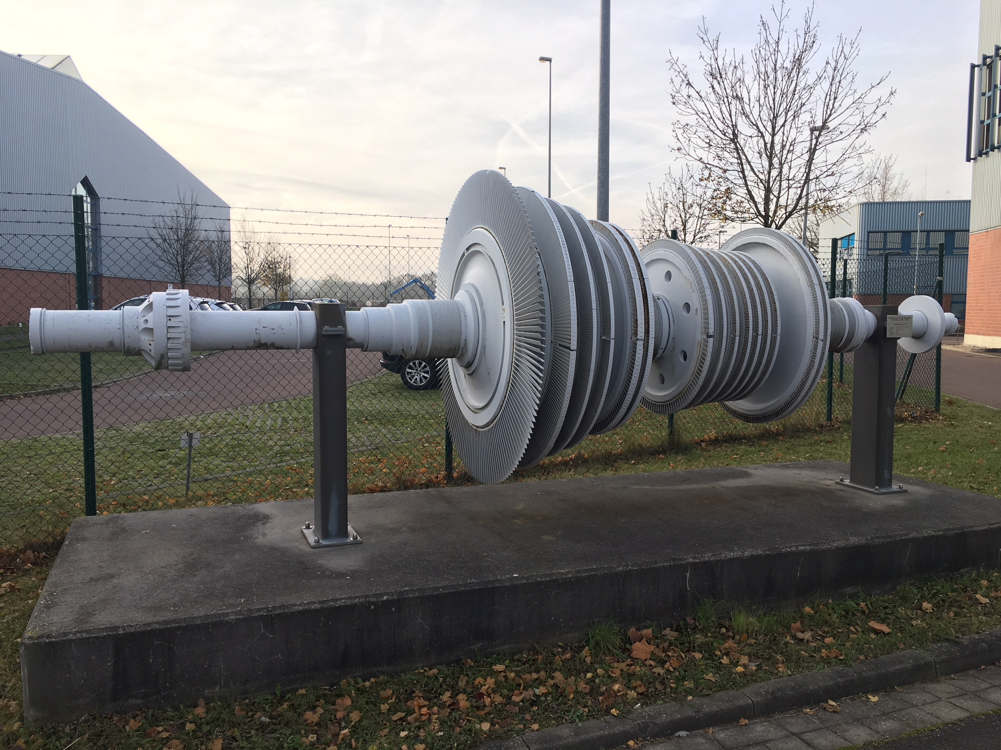 Turbinenläufer einer Dampfturbine des ehemaligen Kraftwerkes Rudolf Breitscheid in Halle (Saale) (1925-1995), heute Heizkraftwerk Halle-Trotha.